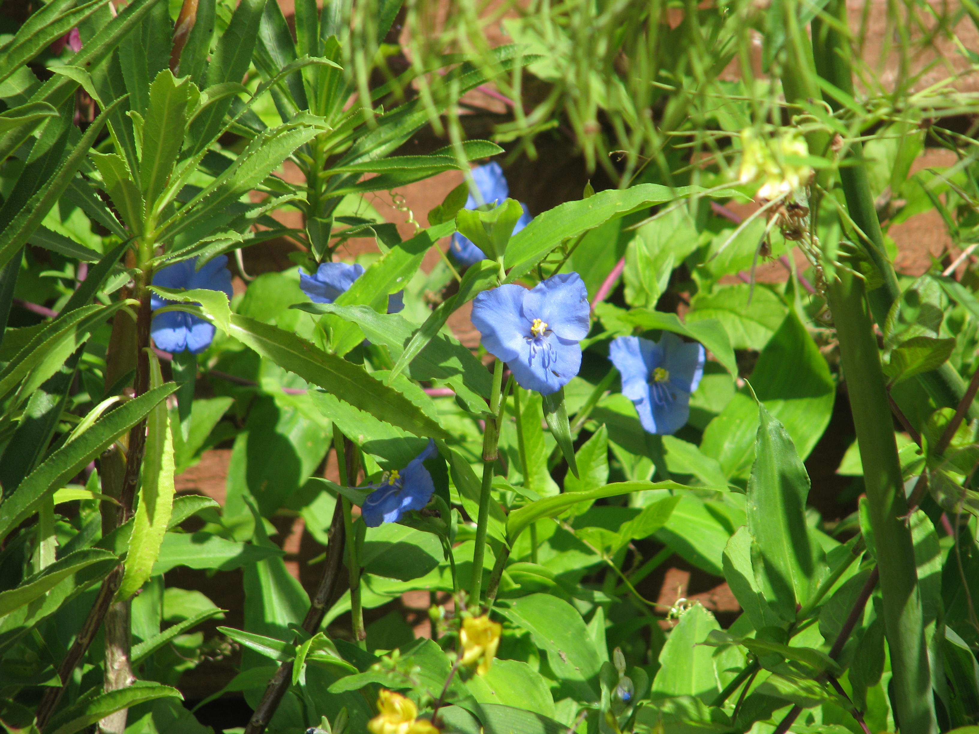 Commelina robusta